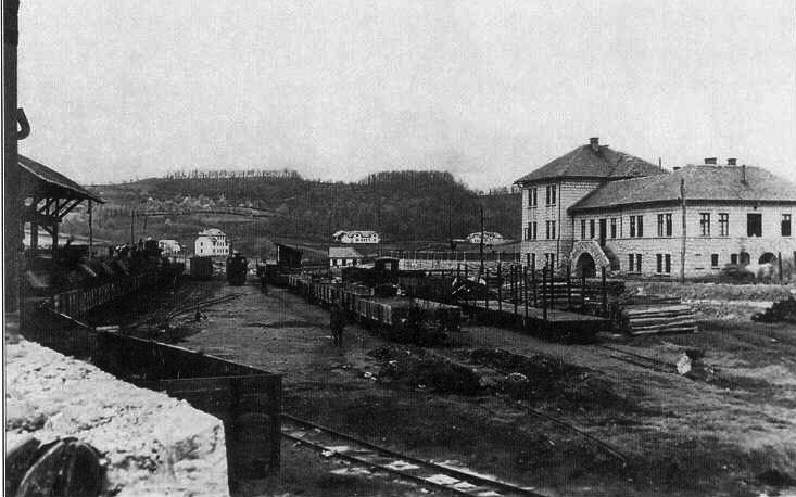 Stara zgrada Direkcije Rudnika Ugljevik, 30-ih godina